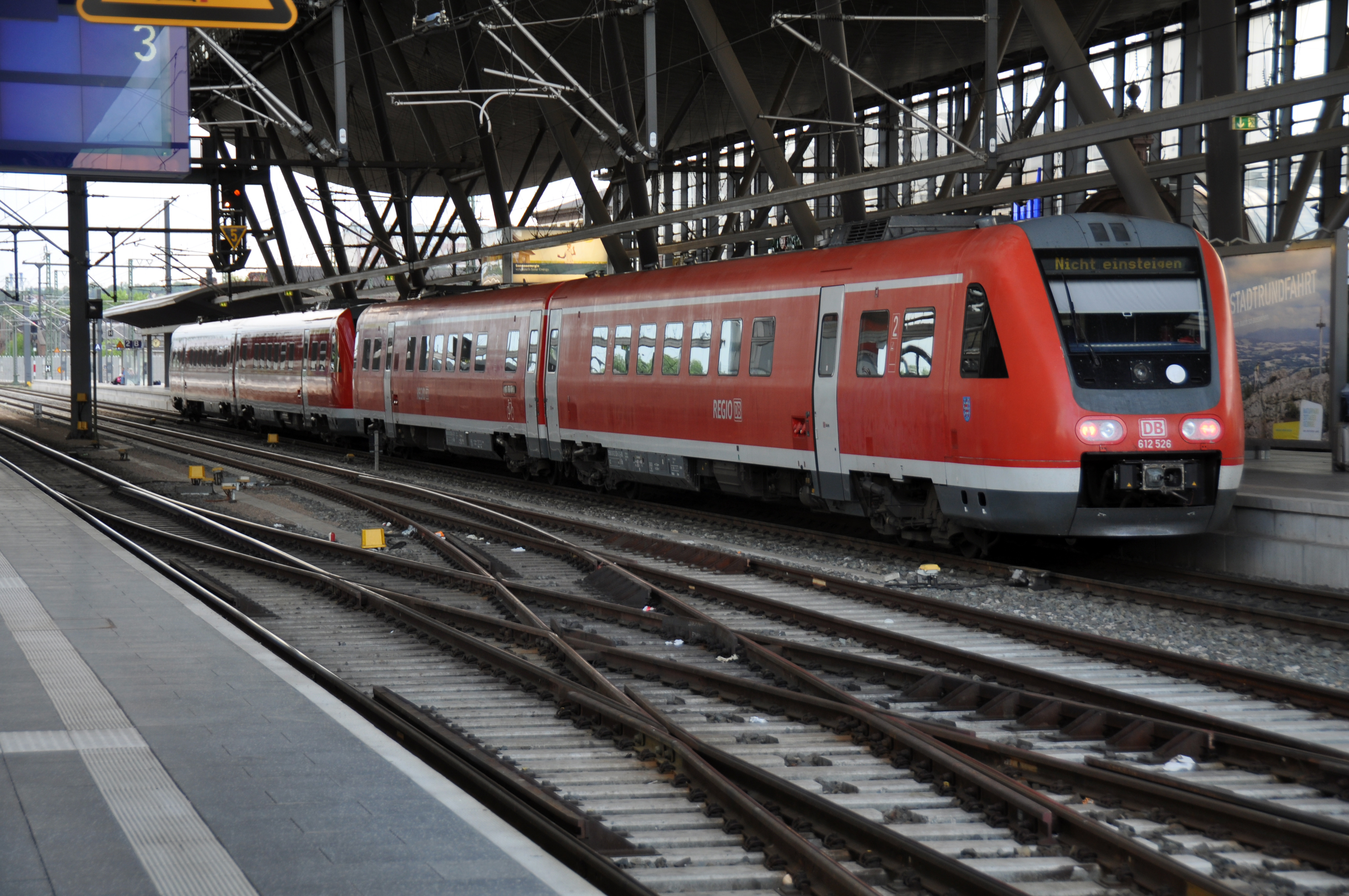 Erfurt Hauptbahnhof